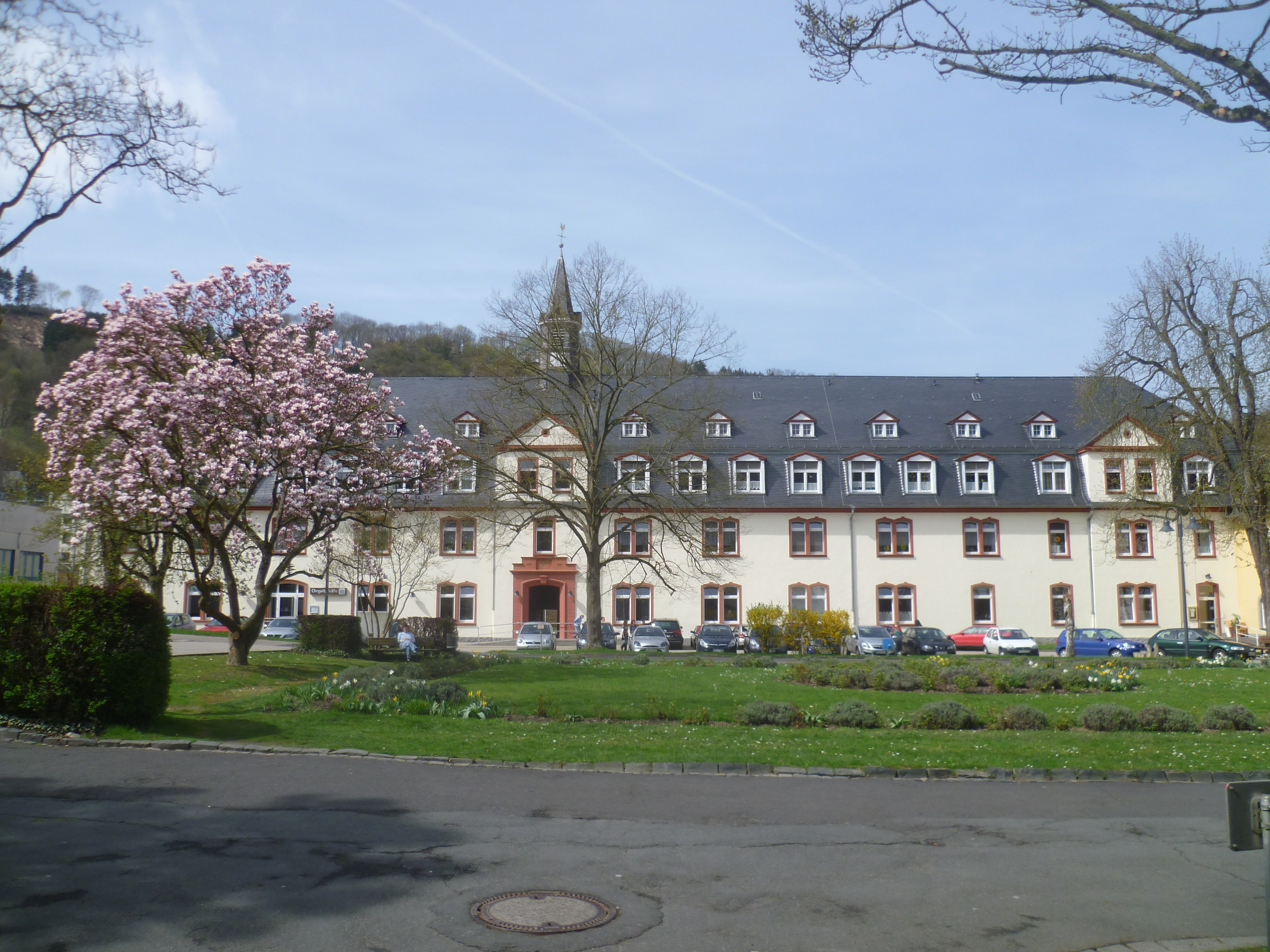 Das Alte Haus an den Heimen Scheuern